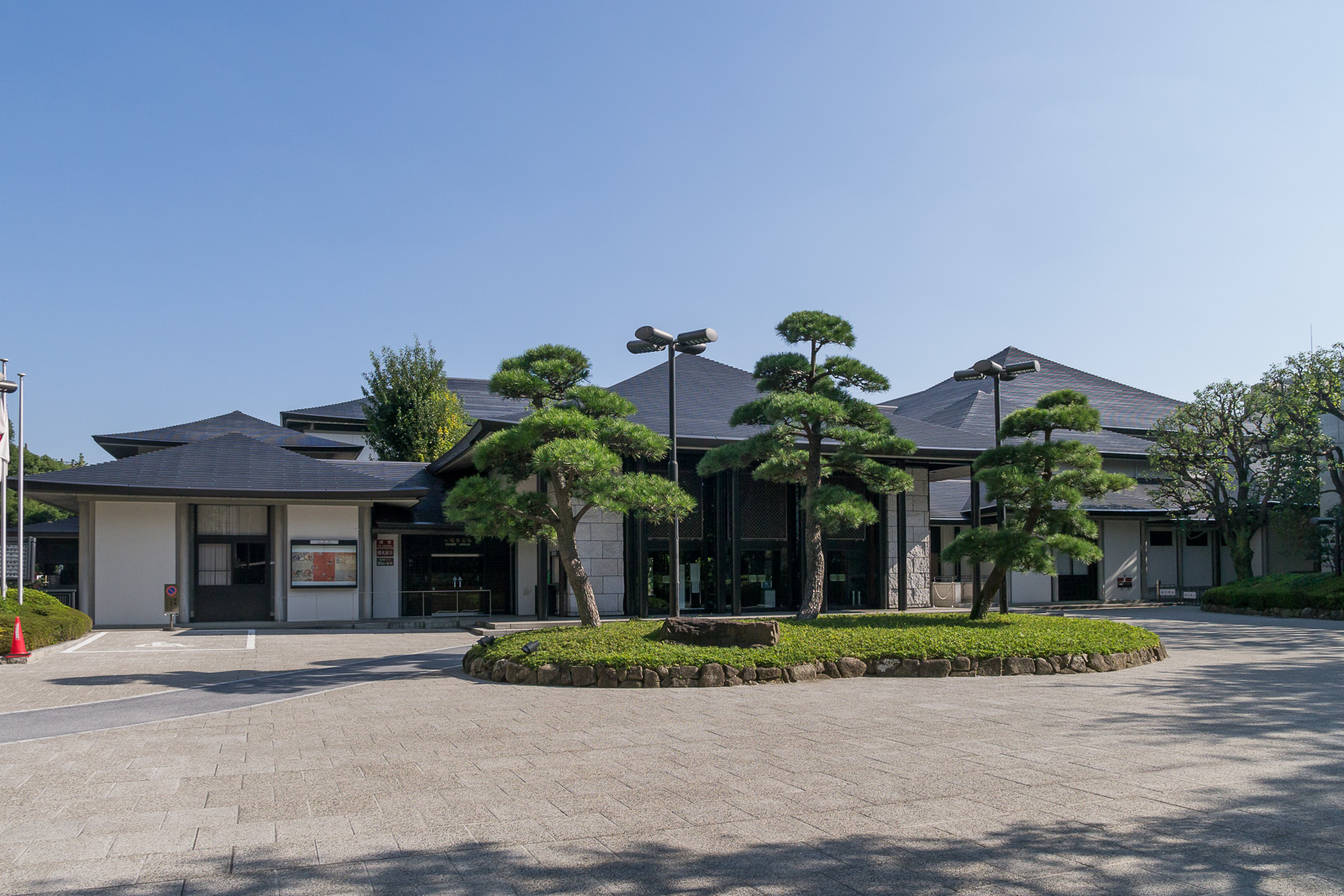 国立能楽堂、東京都渋谷区千駄ヶ谷。